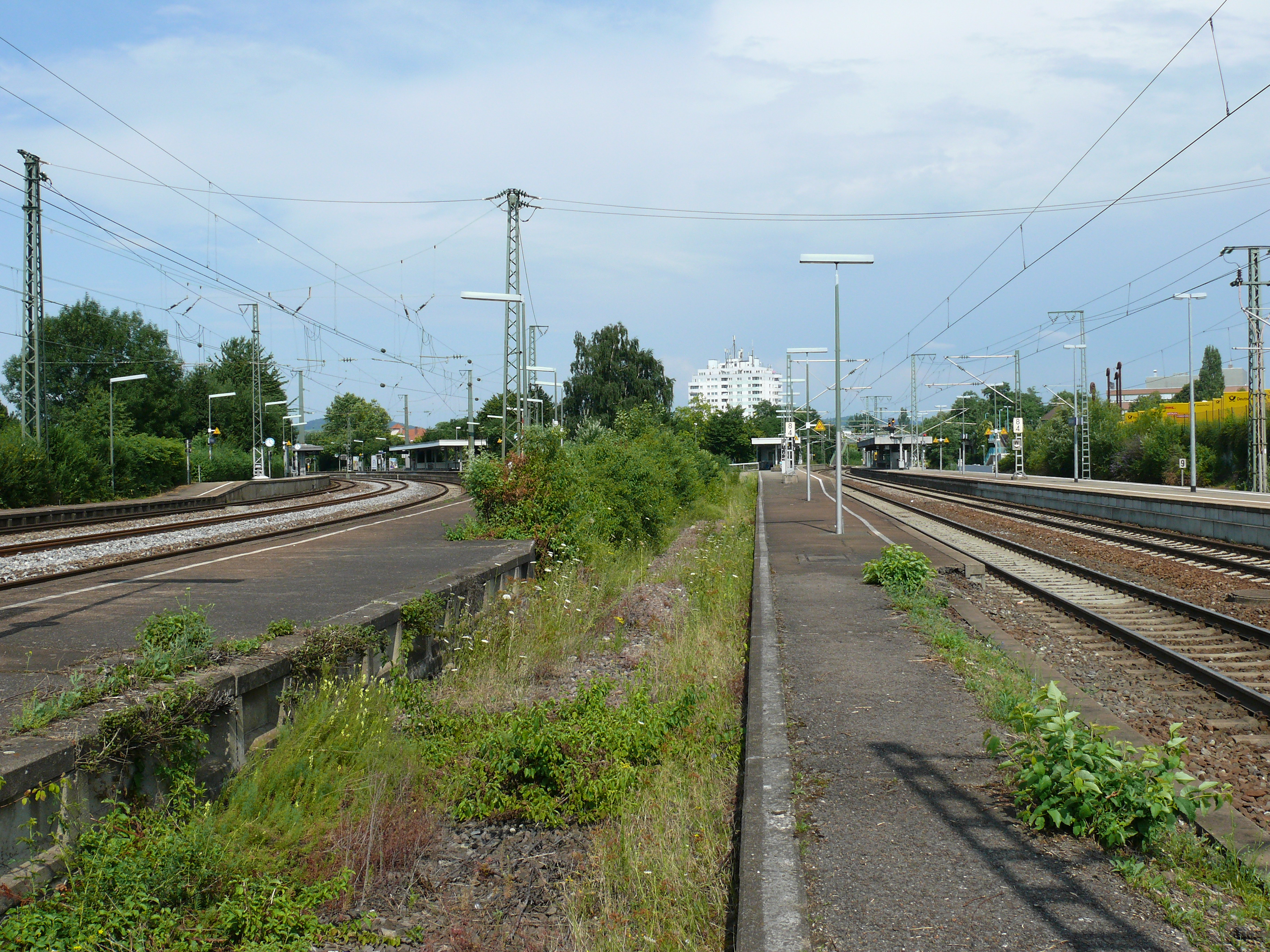 Der Bahnhof in Waiblingen. Rechts die Remsbahn Richtung Schorndorf und links die Murrbahn Richtung Backnang. Der leere Gleistrog beherbergte früher das Gleis 1A bzw.4